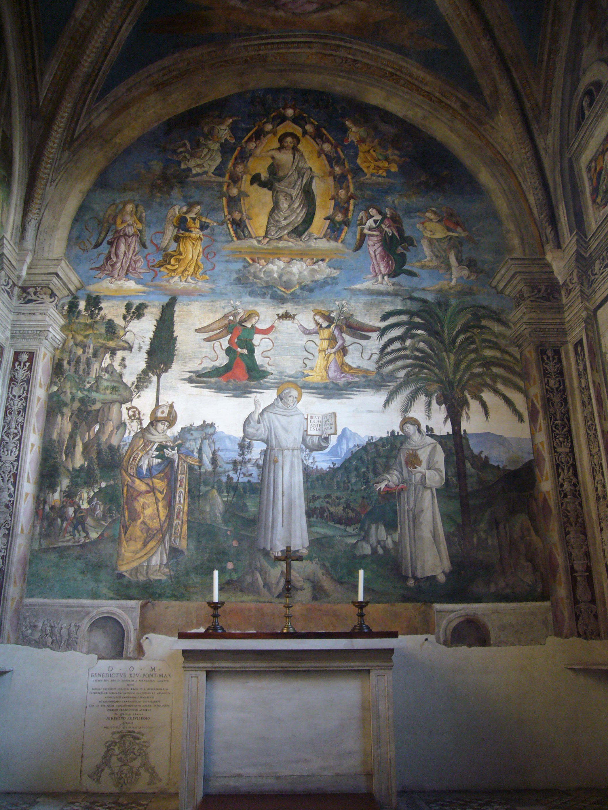 Roma, Aracoeli, cappella di S. Bernardino affresco centrale (Pinturicchio, 1486). Da sinistra: san Ludovico di Tolosa, san Bernardino, sant'Antonio da Padova